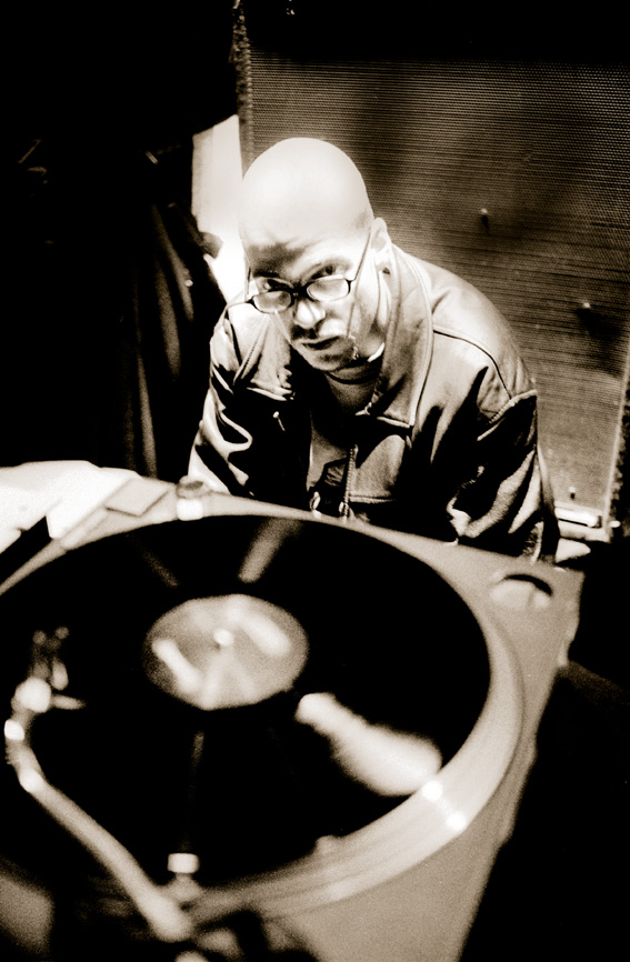 Rapper Curse on stage im Schlachthof/Hamburg